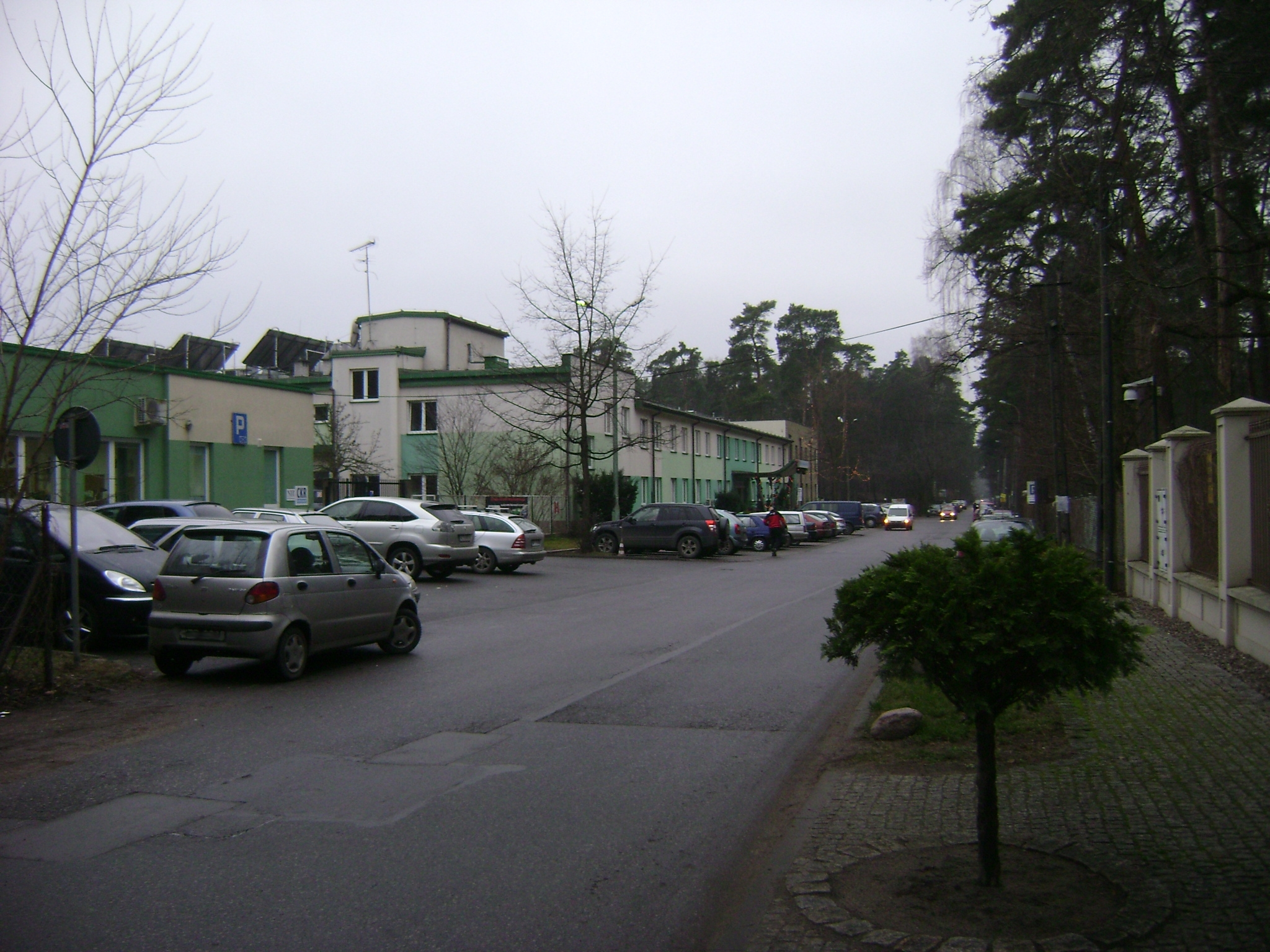 Polska. Konstancin-Jeziorna. Centrum Kompleksowej Rehabilitacji. Ulica Gąsiorowskiego